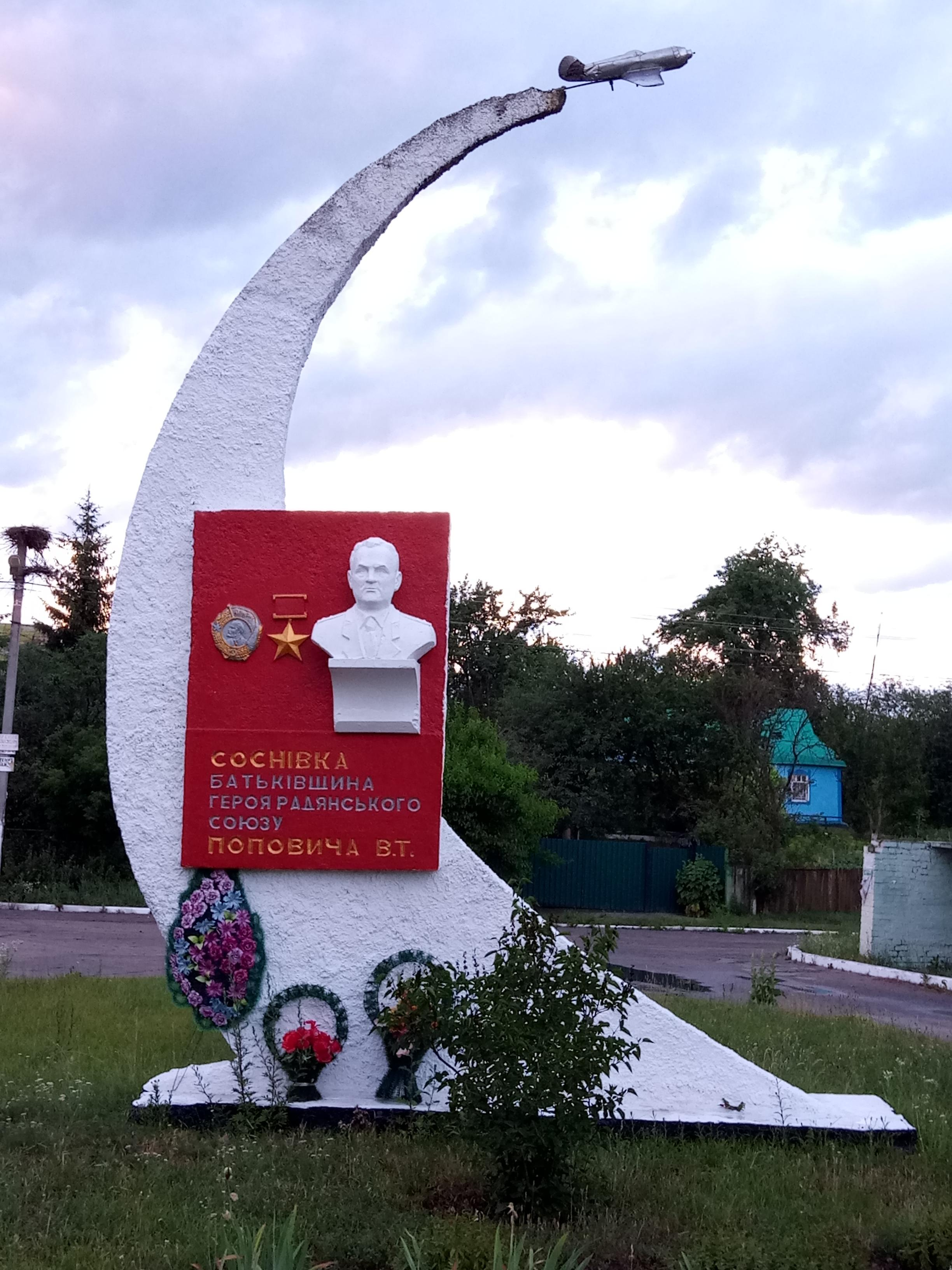 Пам'ятник Поповичу Володимиру Трофимовичу в с Соснівка